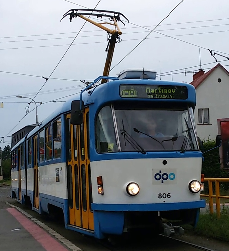 Tramvaj Tatra K2G ev. č. 806 ve smyčce Vřesinská